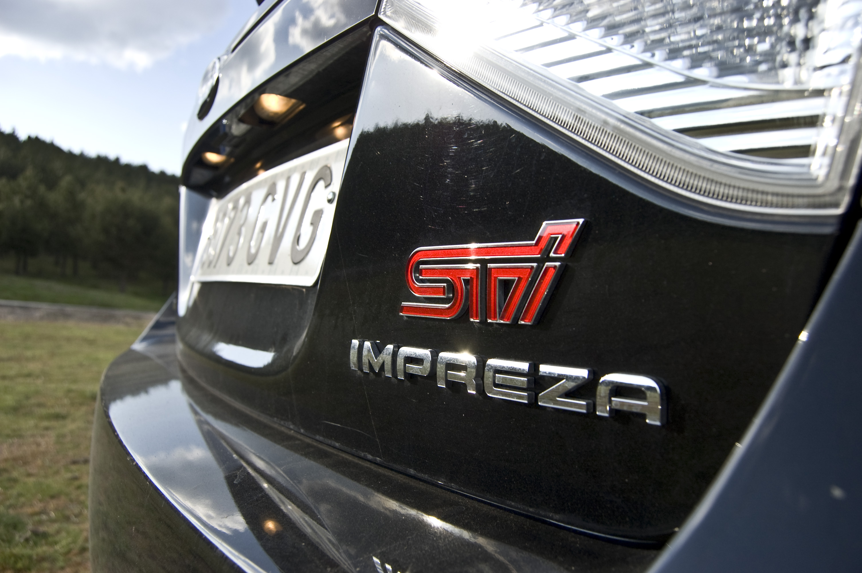 Subaru Impreza STI Prueba para Diariomotor